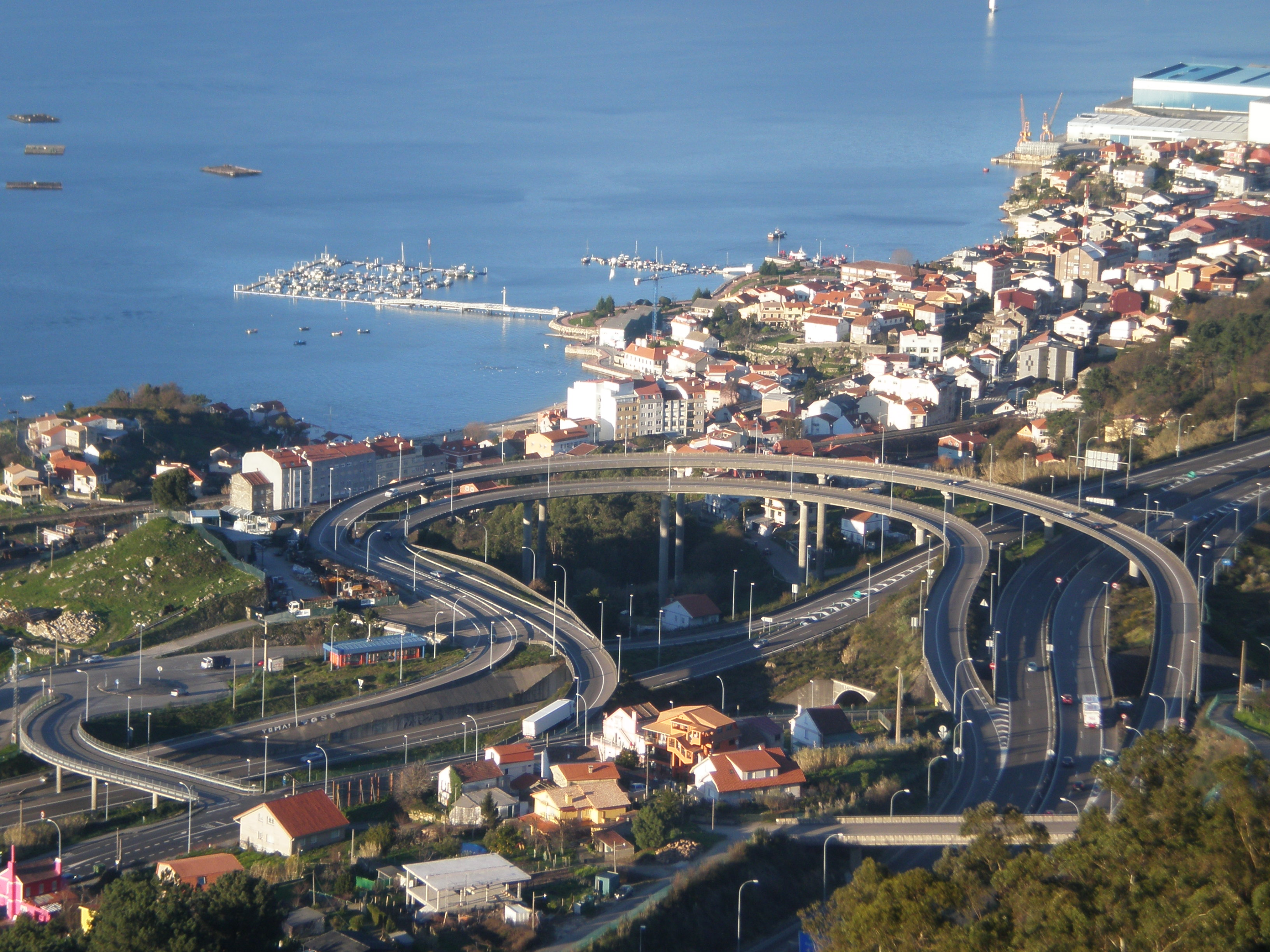 Circunvalación AP-9 (Teis)